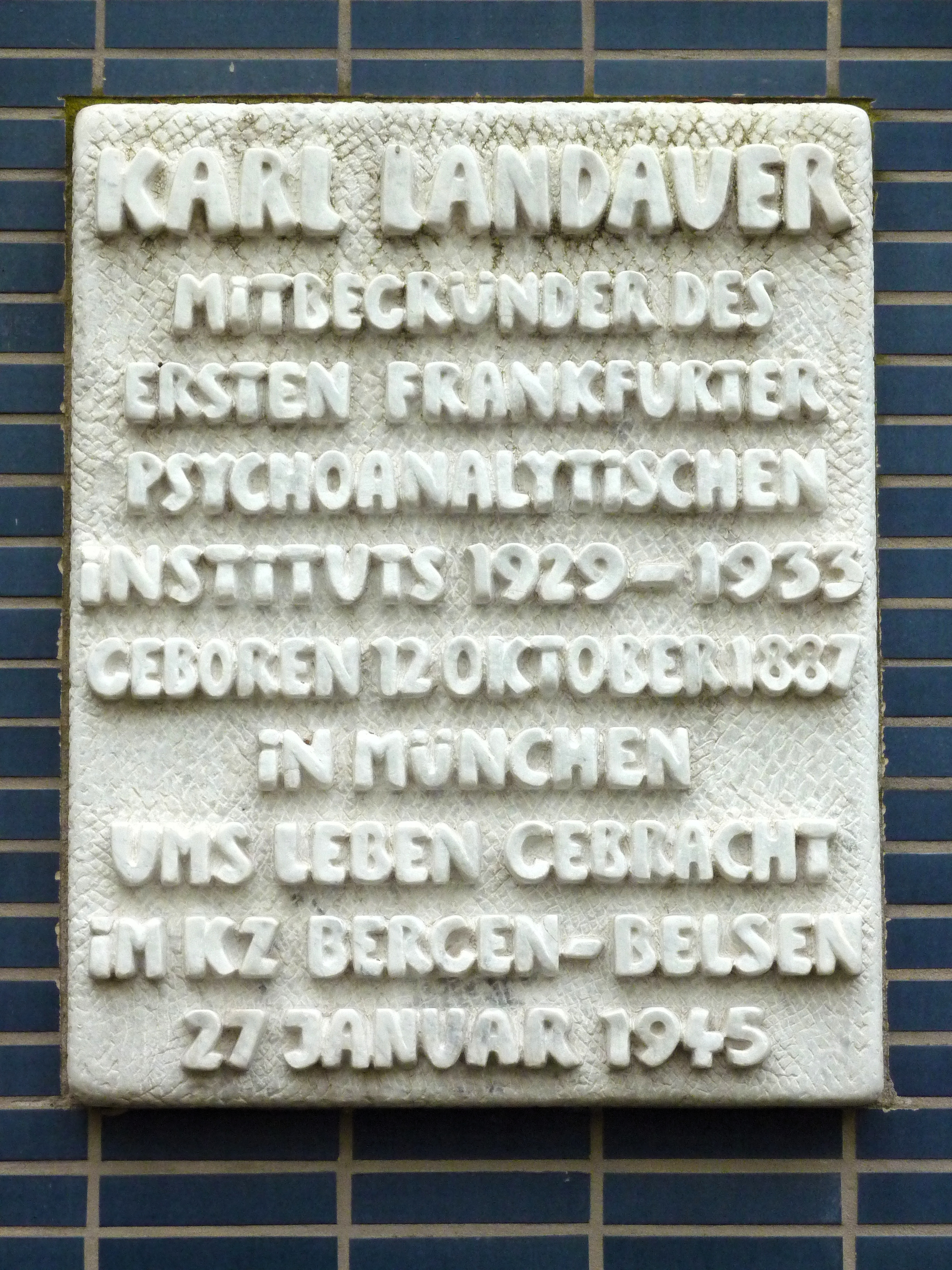 Gedenktafel für Karl Landauer (1887–1945, Psychoanalytiker) am Sigmund-Freud-Institut im Stadtteil Westend-Süd in Frankfurt am Main. Enthüllt am 29. Januar 1991. Tafel aus weißem Marmor, gestaltet von Christoph Krause. Inschrift der Gedenktafel (Interpunktion hier teilweise ergänzt): „Karl Landauer, Mitbegründer des ersten Frankfurter Psychoanalytischen Instituts 1929–1933. Geboren 12. Oktober 1887 in München, ums Leben gebracht im KZ Bergen-Belsen, 27. Januar 1945“